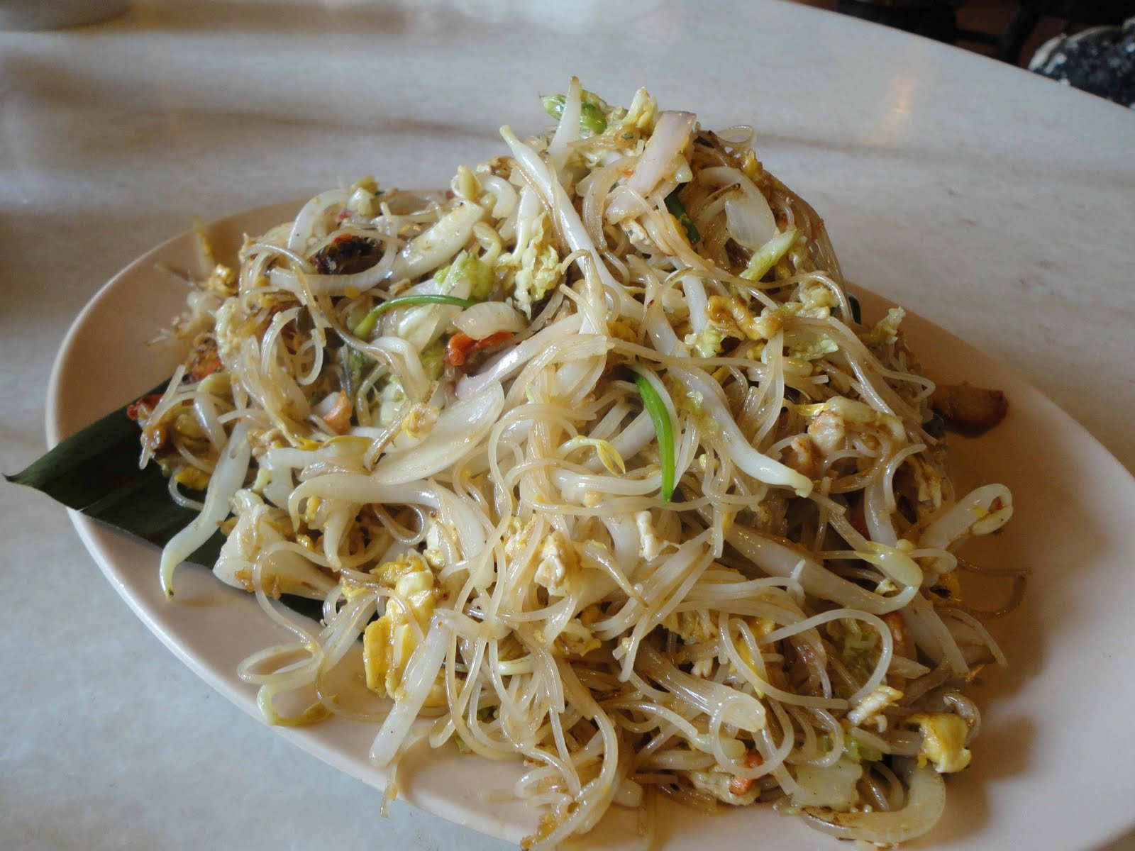 吉隆坡金蓮記的星洲炒米粉